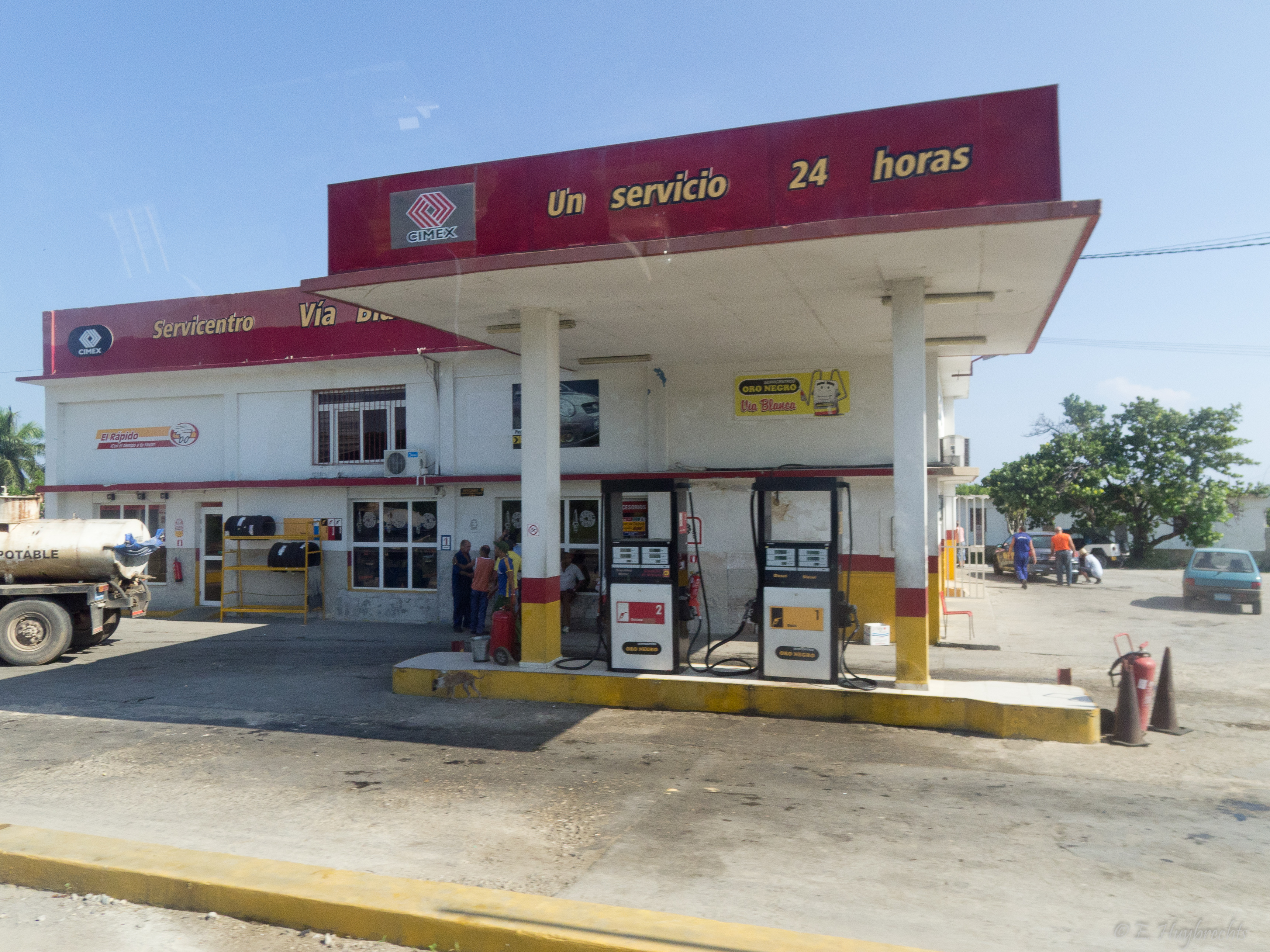 20 juillet 2011 (SAM_0603)